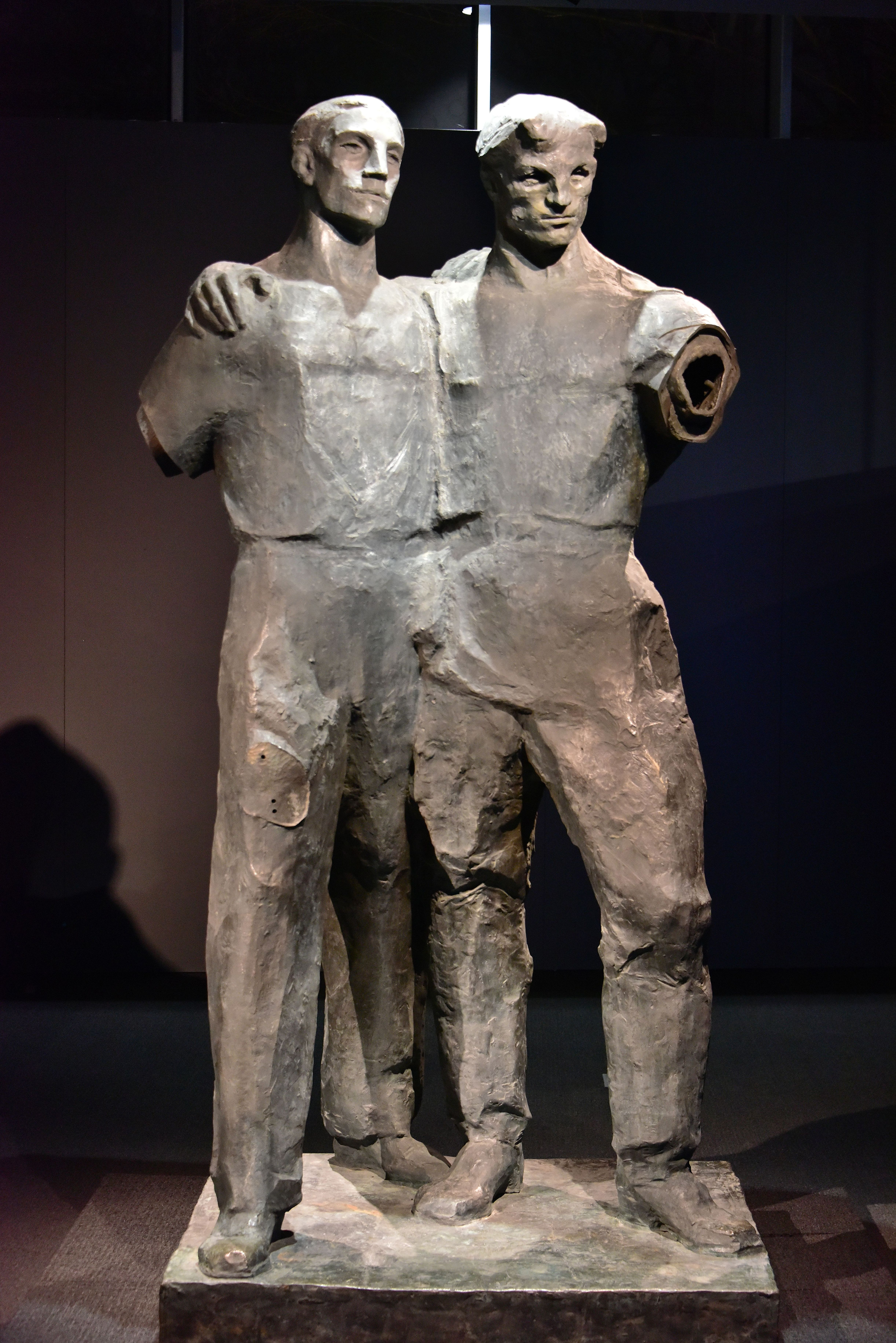 Rzeźba Przyjaźń Aliny Szapocznikow eksponowana w siedzibie domu aukcyjnego Desa Unicum przy ul. Pięknej 1A w Warszawie